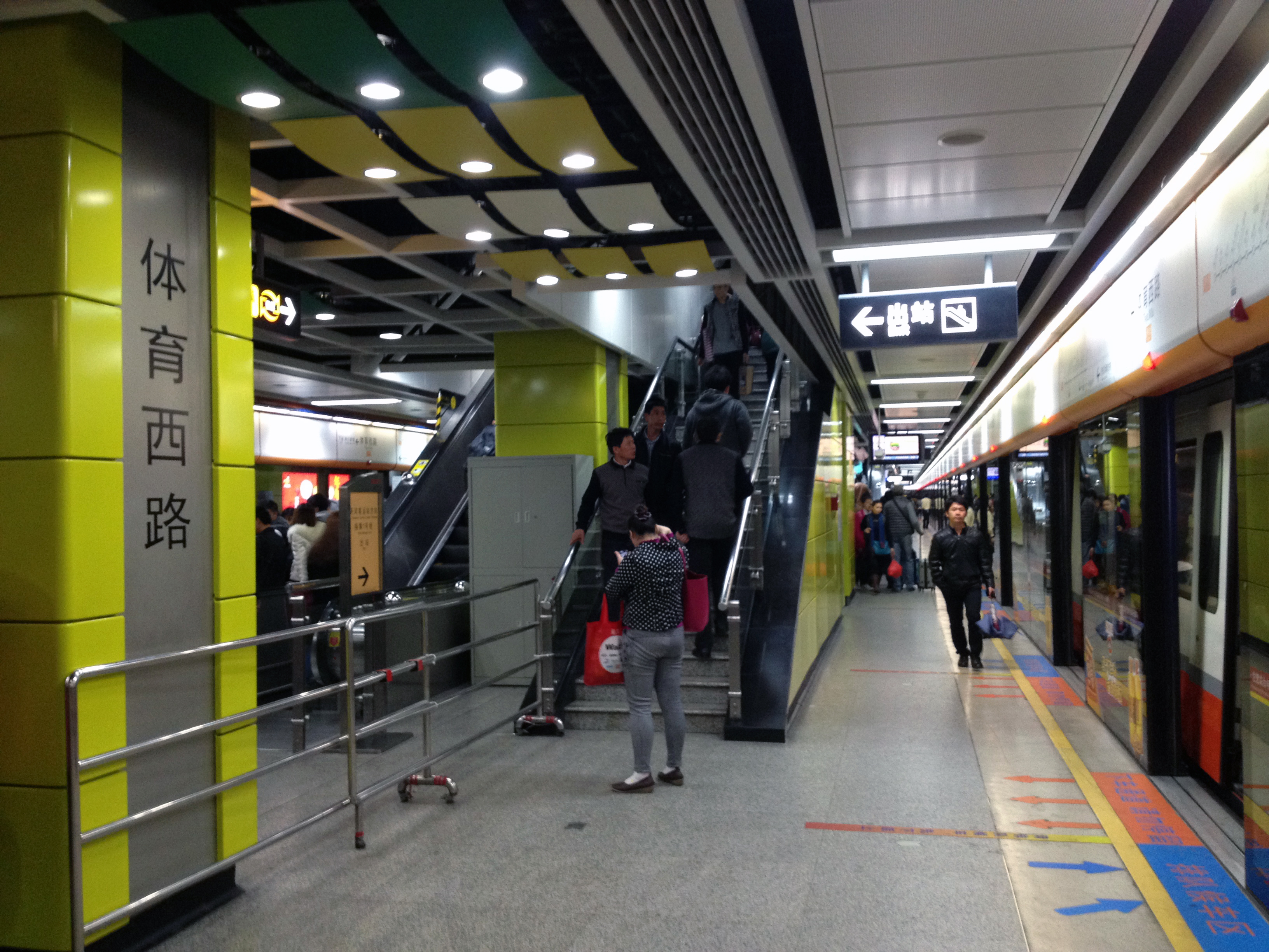 广州地铁3号线体育西路站往机场南方向的月台